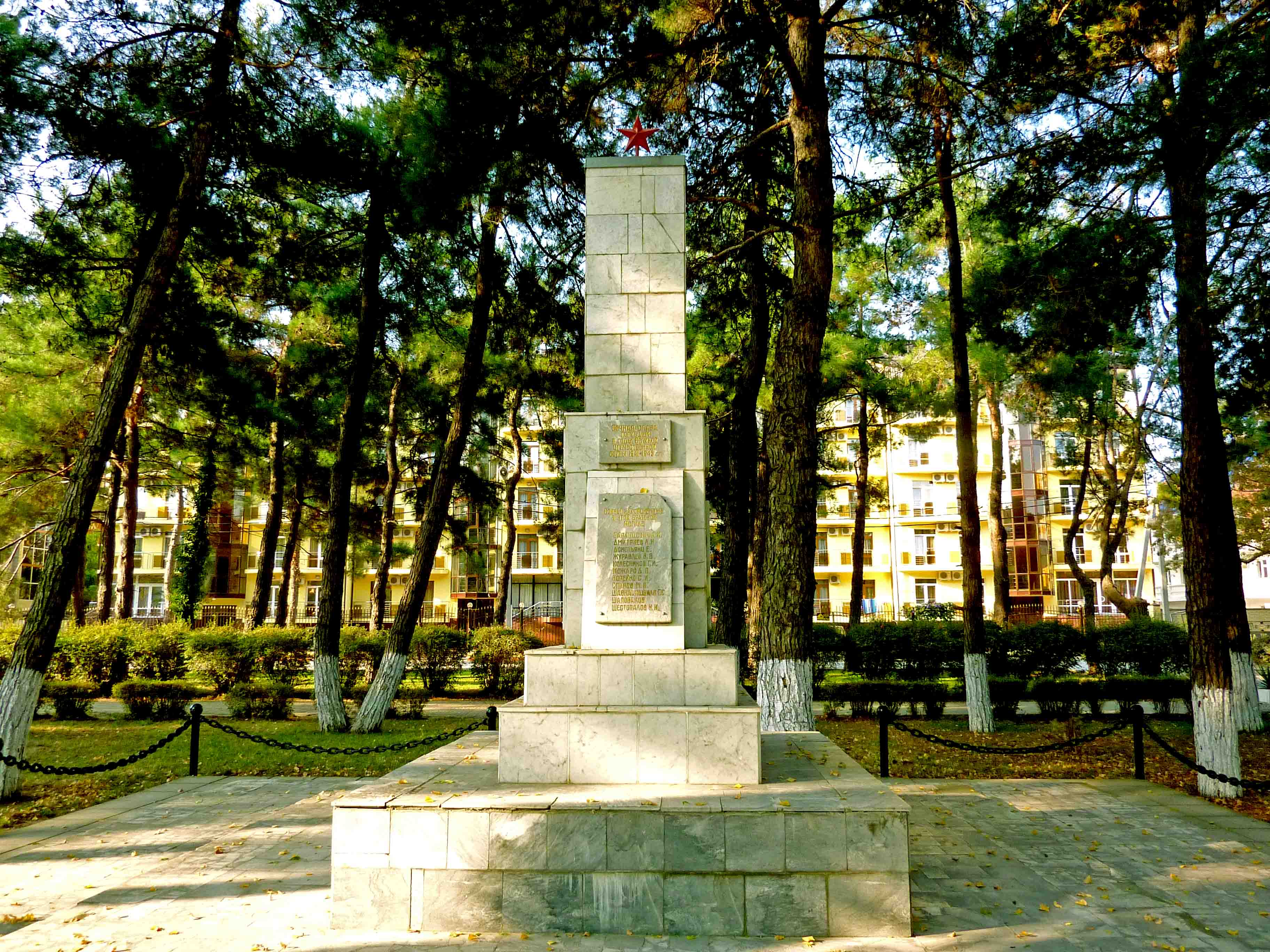 Памятник защитникам Отечества в Дивноморске